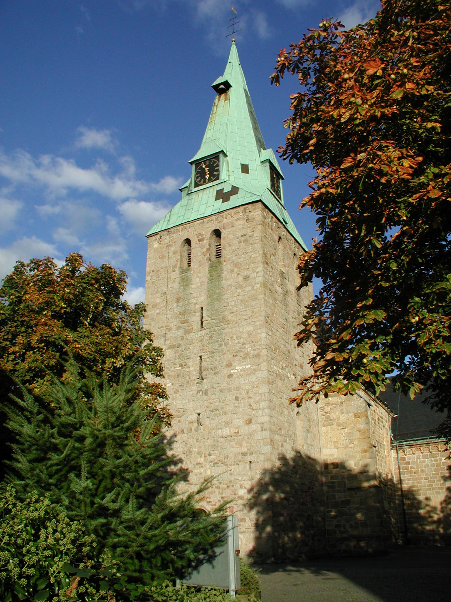 Evangelische Stadtkirche Westerkappeln